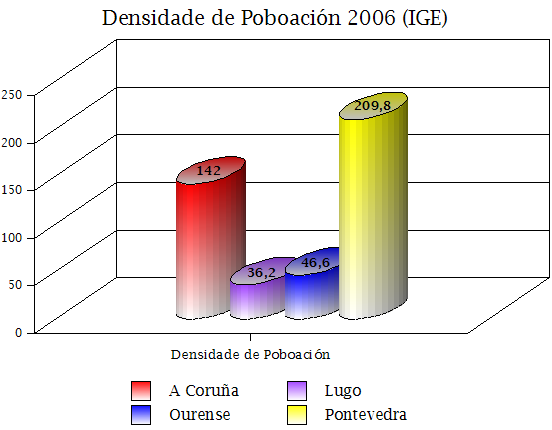 Densidade de poboación de Galiza por provincias - 2006 (IGE)